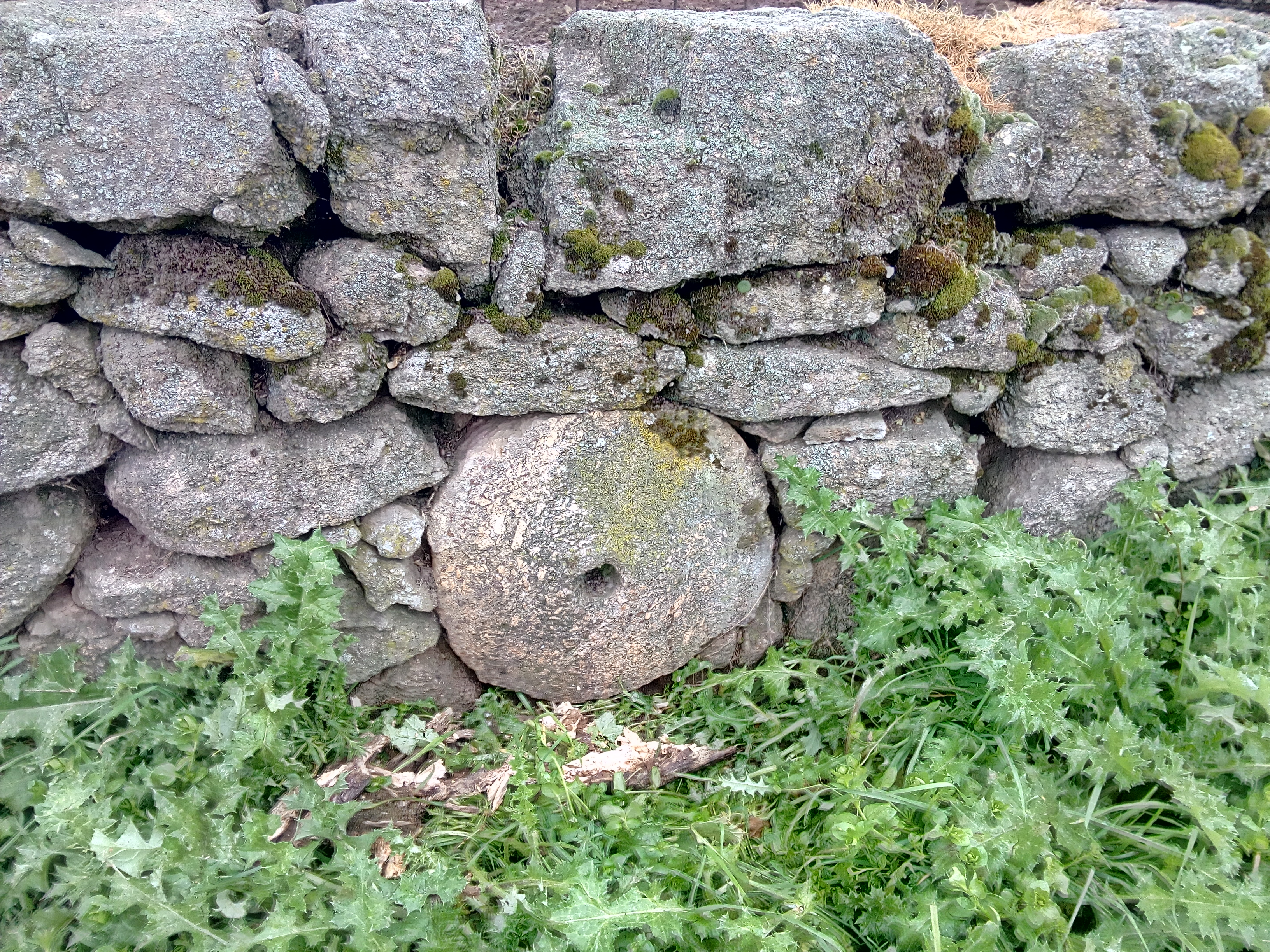 molino domestico romano en las inmediaciones de la finca "los recueros".